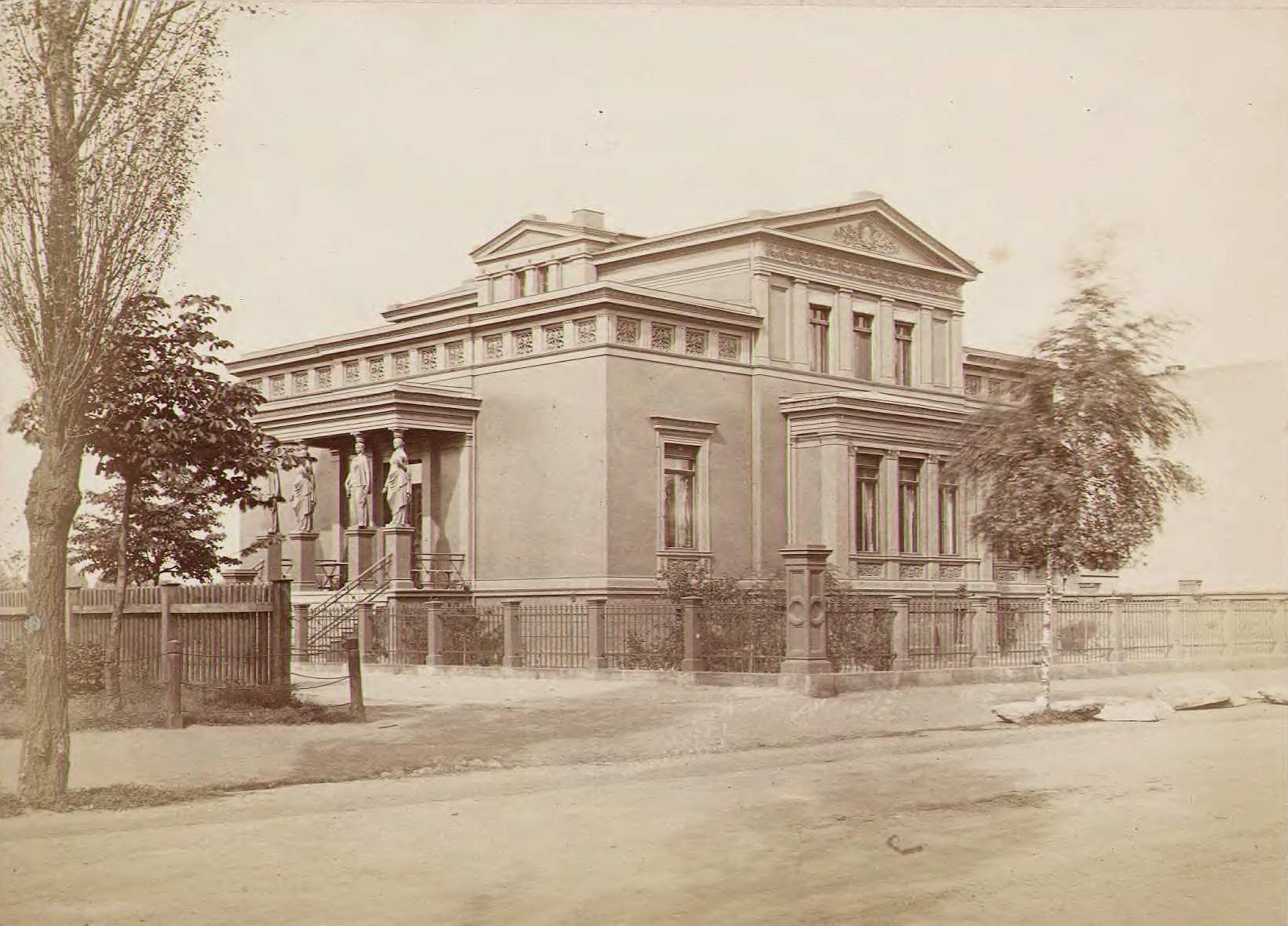 Villa von Friedrich Wilhelm Grundmann in Kattowitz.